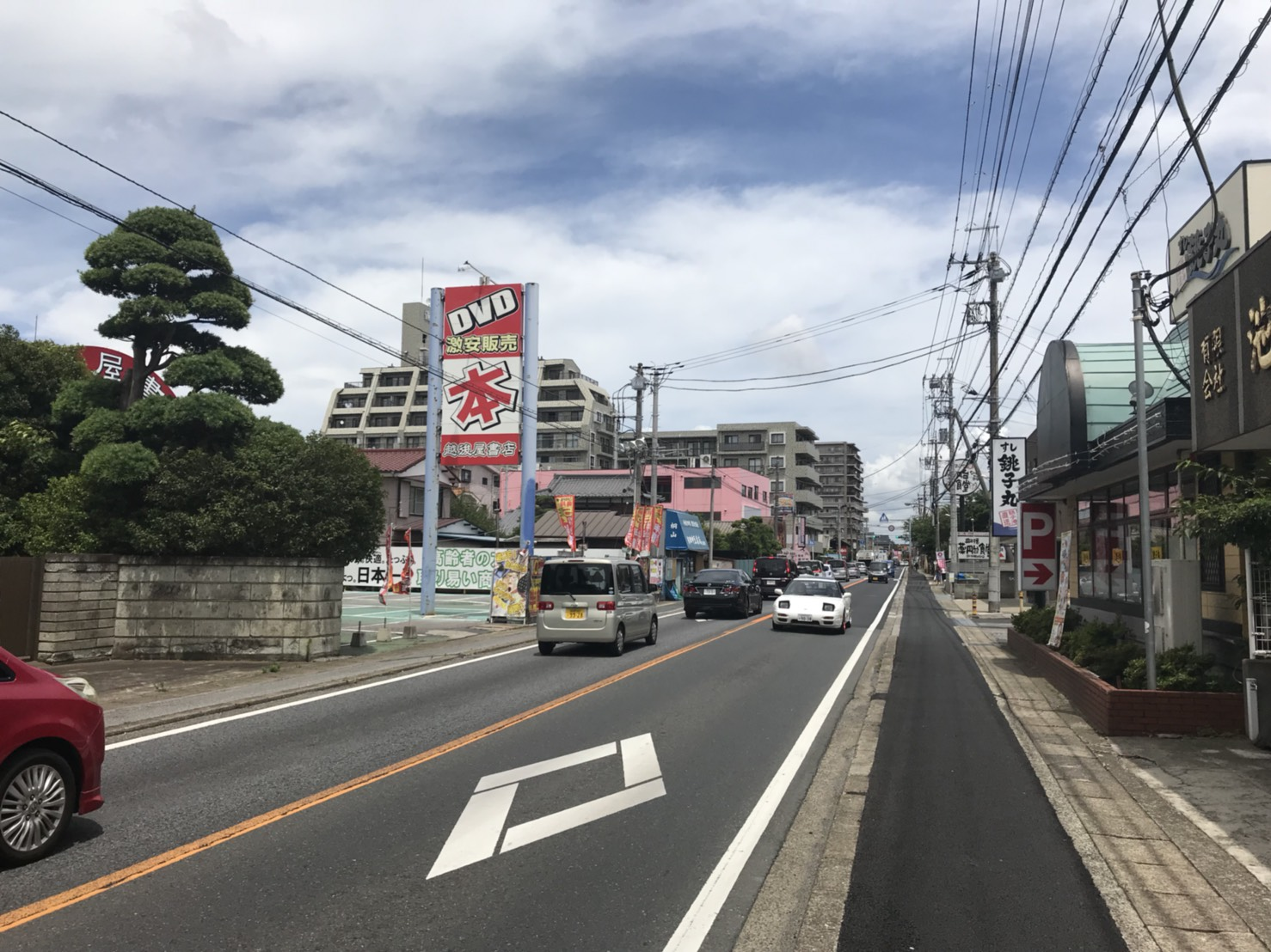 成田街道から見た薬円台の町並み